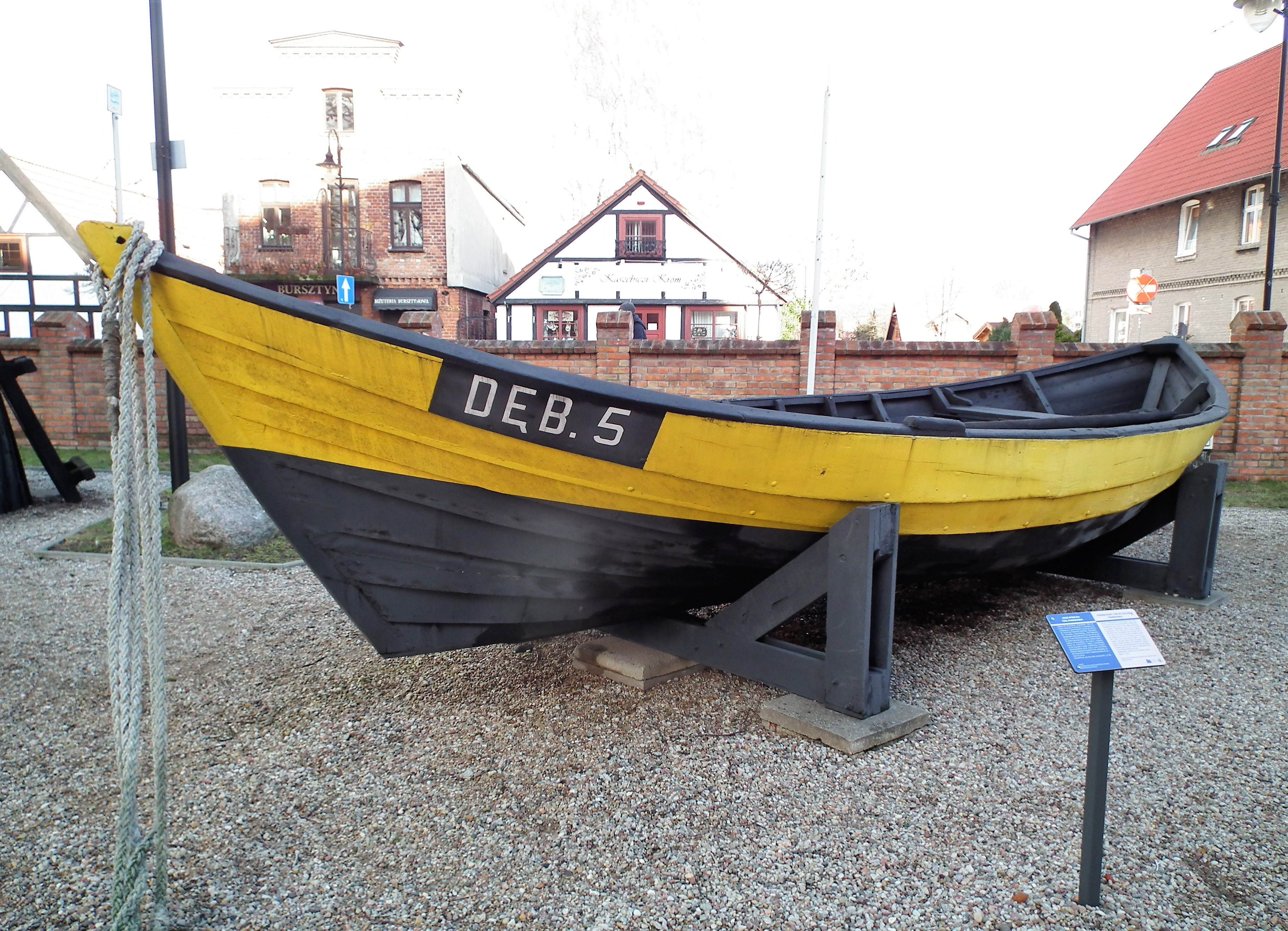 Pomeranka w Muzeum Rybackim na Helu.